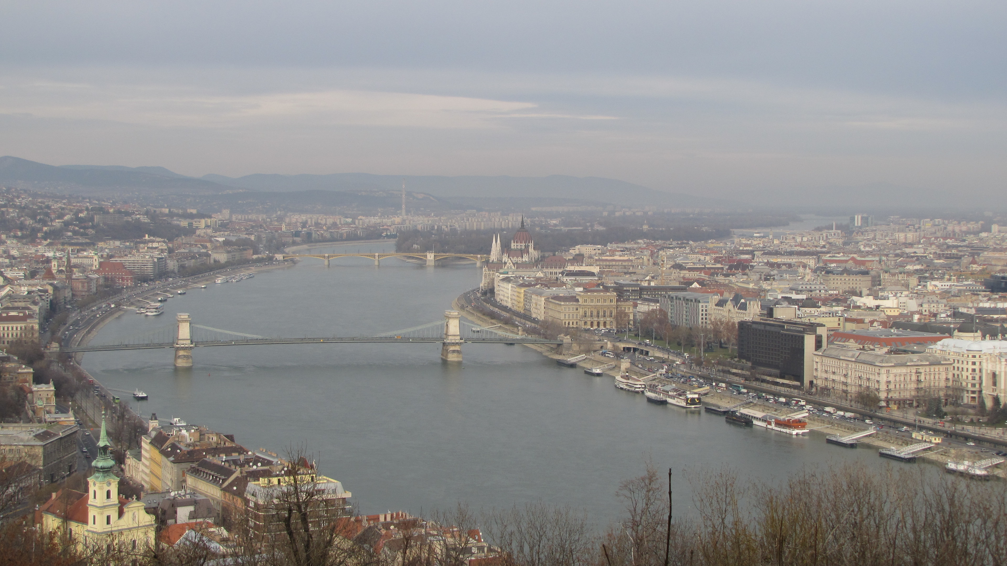 Blick auf Budapest vom Gellértberg (Zoom)